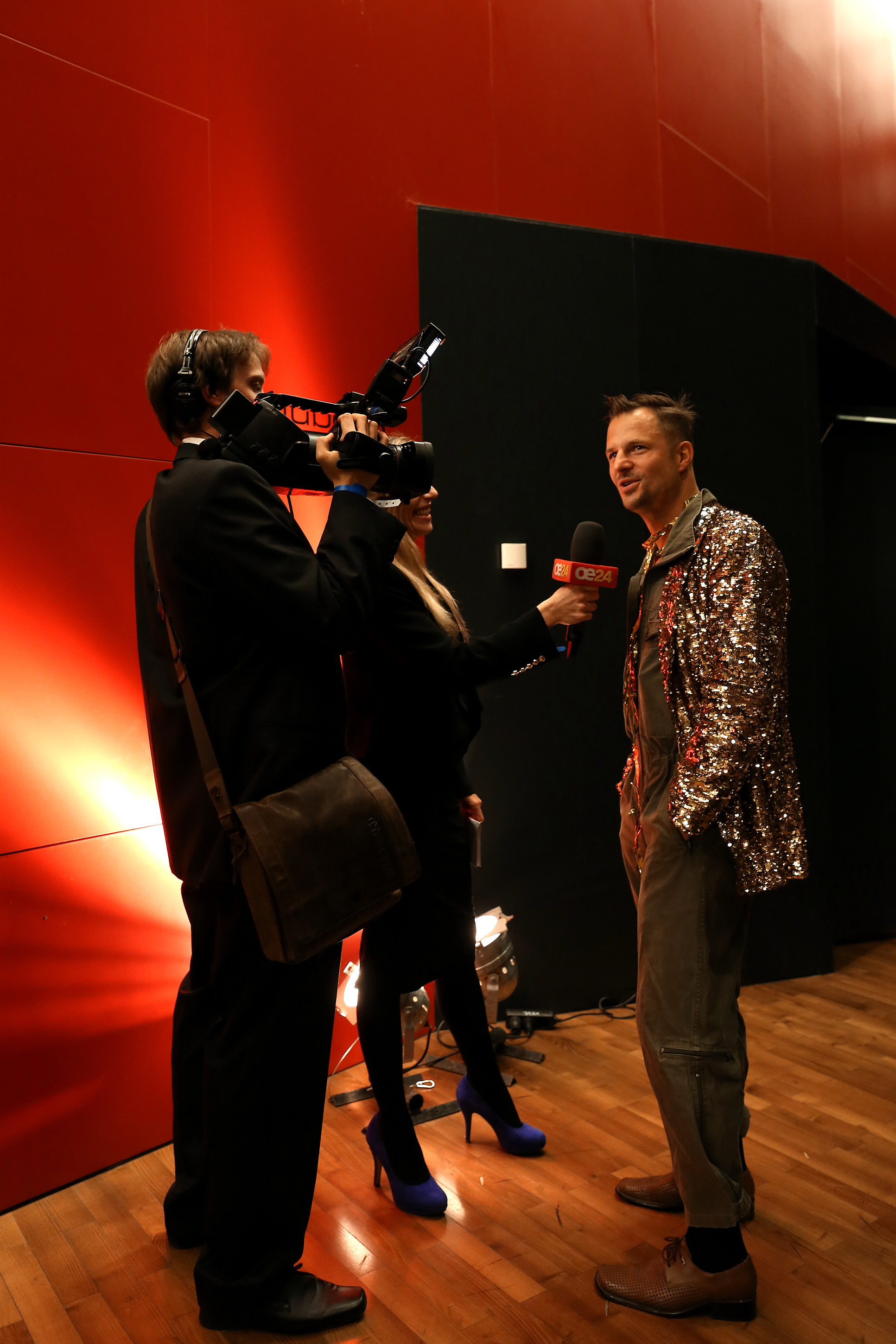 Philipp Hochmair - Nestroy-Theaterpreis 2013 in der Halle F der Wiener Stadthalle (Wien, Österreich).